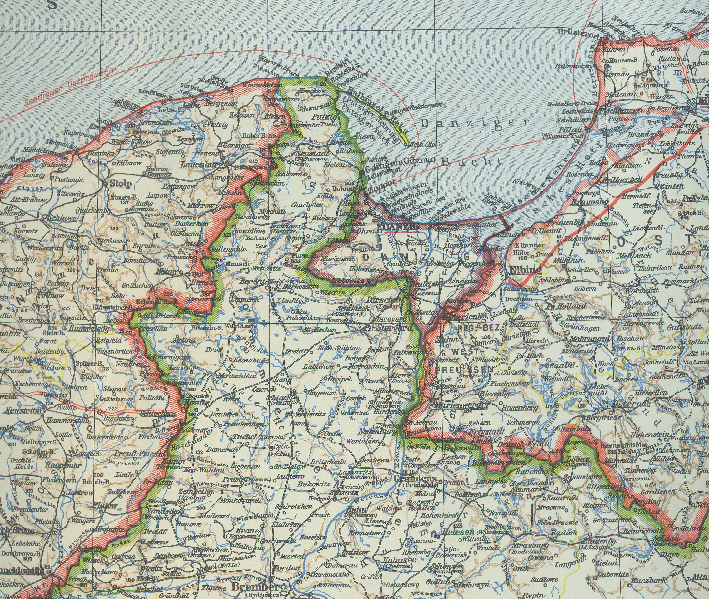 Landkarte des polnischen Korridors